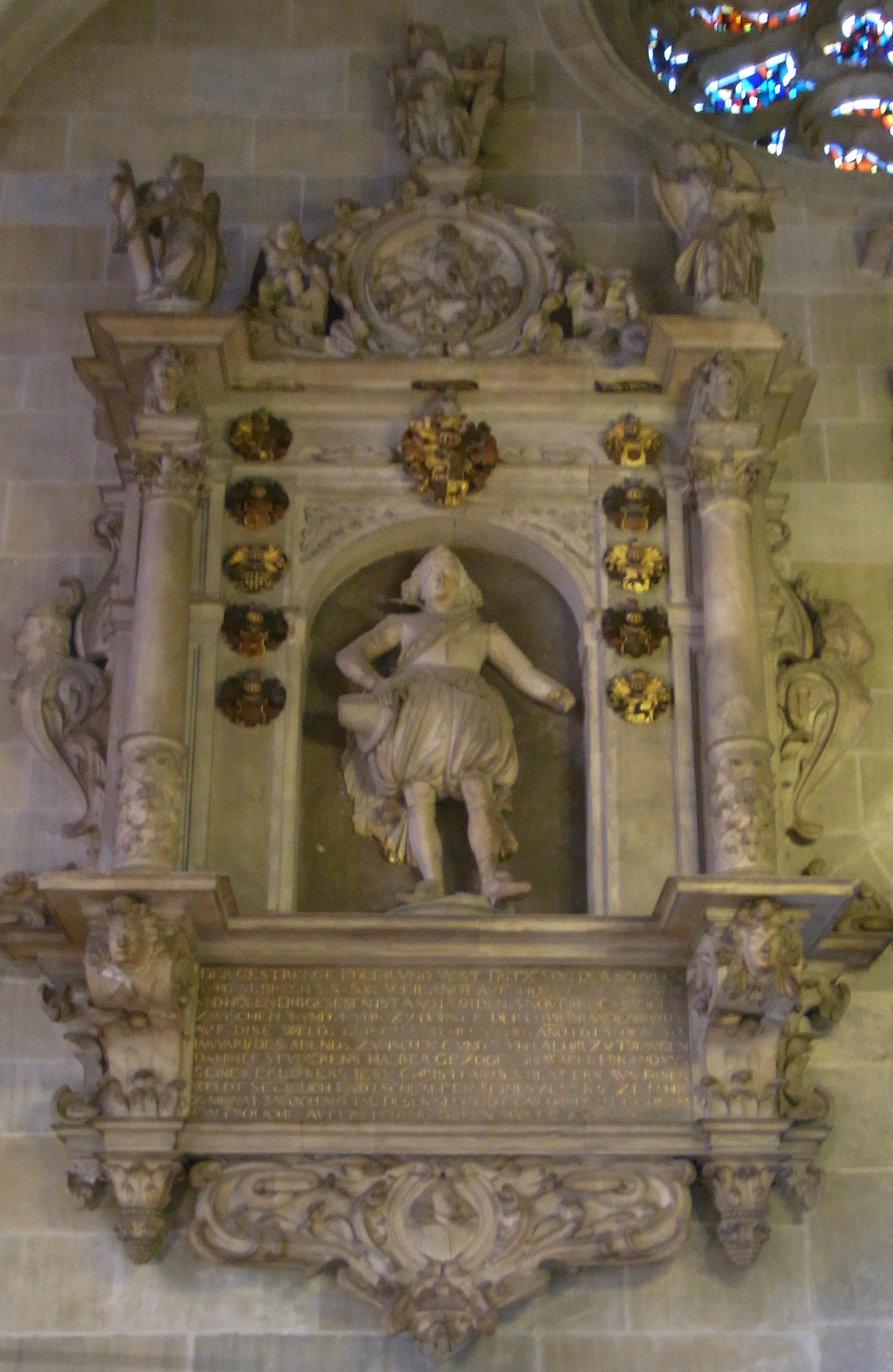 Stiftskirche St. Georg, Tübingen Fritz von Schulenburg /1591 - 1613), Student aus Brandenburg Alabasterepitaph, Jelin Nachfolger